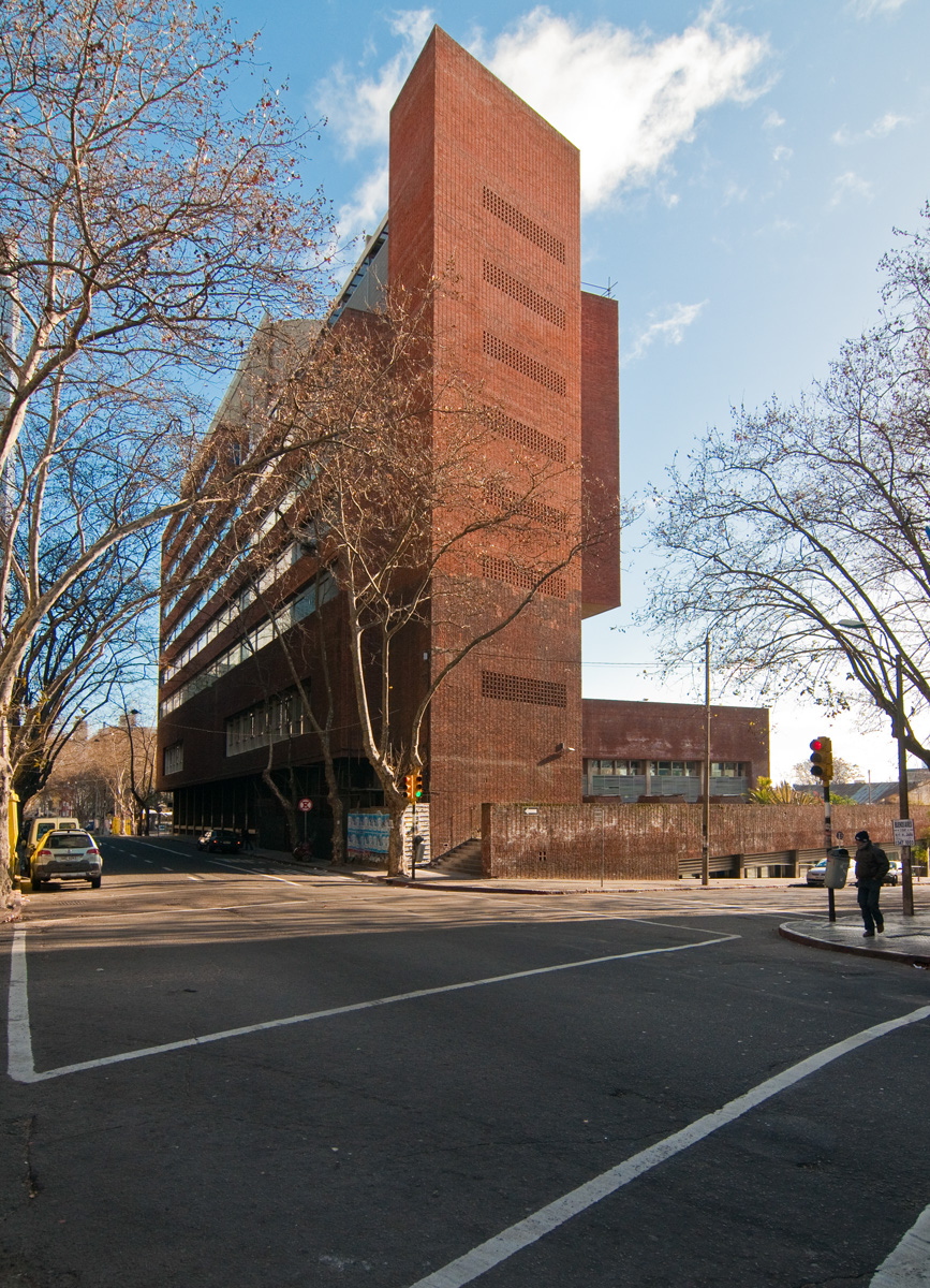 Banco de Previsión Social. Ubicado en el departamento de Montevideo